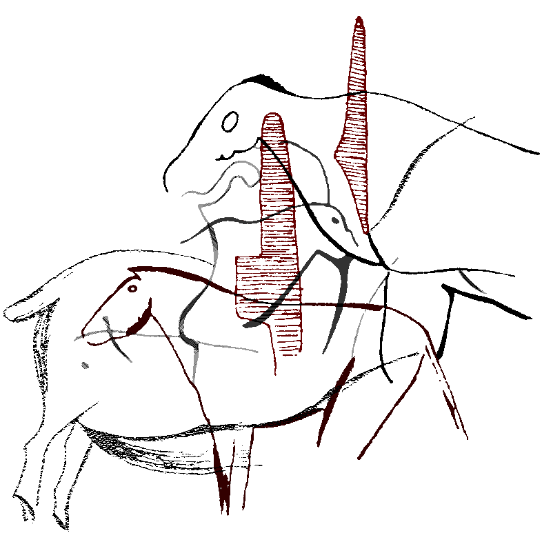 Diversas figuras superpuestas (claviformes, grabados, pinturas...) del panel número 89, de la Galería C (tercer santuario) de la Cueva de La Pasiega, en el monte Castillo, localidad de Puente Viesgo (Cantabria, España)